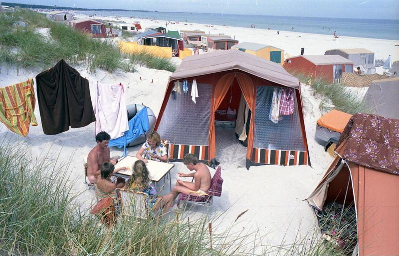 ZB/ Jürgen Sindermann 2/8/90-408KB-Bezirk Rostock: Zeltplatz Prerow/ Für drei Wochen hat es Familie Specht aus Thüringen nach Prerow gezogen, sie erholen sich bereits zum dritten Mal auf diesem Zeltplatz in den Dünen. Ein Camping-hoch erlebt auch in diesem Jahr der Zeltplatz Prerow auf dem Darß. Mit täglich 3.000 Campern, an den Wochenenden werden es in den Ferienmonaten bis zu 4.000, ist trotz erhöhter Zeltplatzgebühren der Urlauberstrom auf einem der am schönsten gelegenen Campingplätzen geblieben. Obwohl die Einnahmen höher sind, lassen die sanitären Einrichtungen sehr zu wünschen übrig und werden von den Erholungssuchenden kritisiert. Als Grund gibt die Zeltplatzleitung an, dass alle Einnahmen an den Rat der Gemeinde abgegeben werden, aber sie müssen für jede Verbesserung um DM betteln. Sollte mehr Sauberkeit aber dennoch nicht möglich sein?